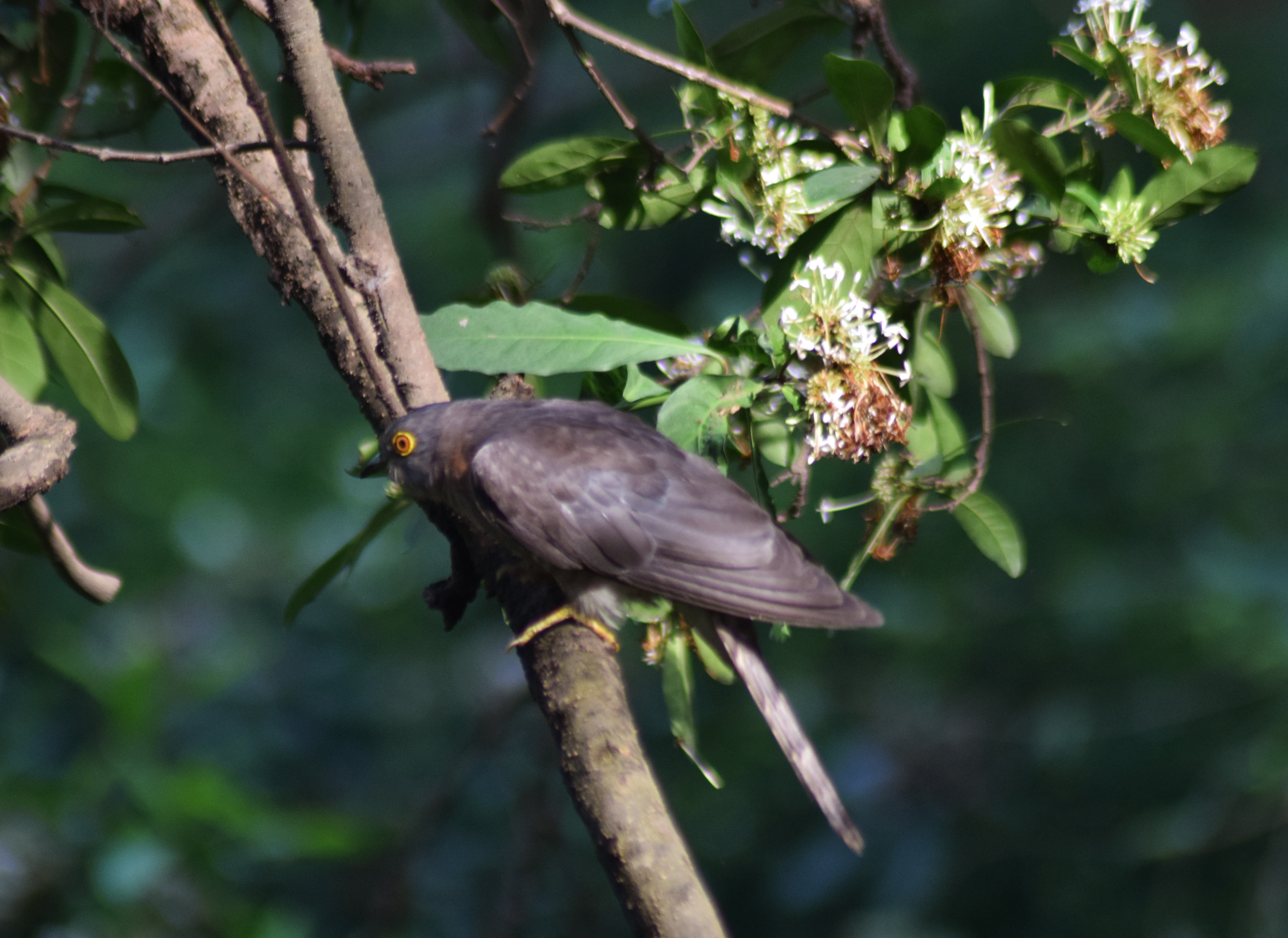 দেশী কালো কোকিলের মত মিষ্টি ডাক কিন্তু অতটা জোড়ালো না। মোটামুটি ১ মিটার দূরে গেলেই মিলিয়ে যায় বাতাসে এমন ক্ষীন স্বরে ডাকে। শীতকালে এরা সাধারনত চোখে পড়ে না। কিন্তু বসন্ত এলেই গাছের উঁচু ডালে ডালে এদের বসে থাকতে দেখা যায়। সাধারণত ঘন সবুজ বনে এদের দেখা যায় আর বাসা বাধে গাছের উঁচু অংশেএ কোটরে বা দুটি ডালের মাঝের খাঁজে। পারতপক্ষে এরা মাটিতে নামে না। গাছে গাছে কিংবা শূন্যে ওড়াউড়ি করেই সময় কাটায়। পতঙ্গ ভক্ষণের লোভে ঝোপ-জঙ্গলের কাছাকাছি বেশিরভাগ সময় উড়ে বেড়াতে দেখা যায়। দেখা যায় রসালো নরম ছোট ফল গাছের আশপাশেও।এদের খাবার এর তালিকায় রয়েছে কীটপতঙ্গ, পোকামাকড়, ছোটখাটো সরীসৃপ। ছোট নরম ফল-ফলাদিও খায়। নিজেরা বাসা বাঁধতে জানে না। জ্ঞাতিভাই কোকিলের মতো পরের বাসায় ডিম পেড়ে পালিয়ে যায়। বেশিরভাগ সময় ডিম পাড়ে একটি। ডিম পাড়ে ঘুঘু, ফিঙ্গে, হলদে পাখির বাসায়। এ পাখির বাংলা নাম: “চোখগেলো”, ইংরেজি নাম: “কমন হাক কুক্কু”, (Common Hawk Cuckoo), বৈজ্ঞানিক নাম: “হাইরোকক্সিস ভেরিয়াস”, (Hierococcyx varius), গোত্রের নাম: কুকুলিদি। এরা লম্বায় ৩৩-৩৪ সেন্টিমিটার। ঠোঁট তীক্ষ। ঠোঁটের ডগা কালো বাদবাকি হলদেটে সবুজ। মাথা থেকে লেজের প্রান্ত পর্যন্ত ধূসর। তবে লেজের ওপর কিছু কালো বলয় রয়েছে। গলার নিচ থেকে বুক পর্যন্ত লালচে বাদামি। বুকের দু’পাশে সরু বাদামি দাগ। চোখের তারা, বলয় হলুদ। পা, আঙুল হলুদ। স্ত্রী-পুরুষ দেখতে একই রকম। সাধারণত একাকী বিচরণ করে। প্রজনন সময় ঘনিয়ে এলে জোড়ায় জোড়ায় দেখা যায়। মার্চ থেকে জুন মাস এদের প্রজন ঋতু। অন্যের বাসায় ডিম পাড়ে বলে সঠিক ডিম ফোটার সময় নির্ধারণ করা যায় নি। তবে একটি ডিম ফুটে বাচ্চা হলে সেই বাচ্চাকে হিংসুটে বাচ্চা বলা যেতে পারে। কারণ সে ডিম থেকে বেড় হয়েই নিজের শরীরের সমস্ত শক্তি দিয়ে অন্য সকল ডিম গুলোকে বাসা থেকে বের করে দেয় বা ফেলে দেয়। এ যেনো প্রকৃতির এক নির্মম নিষ্ঠুরতা।